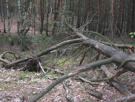 Totholz in Brandenburg Naturpark Nuthe-Nieplitz, Weg Dobbrikow-Wittbrietzen Selbst fotografiert, August 2004